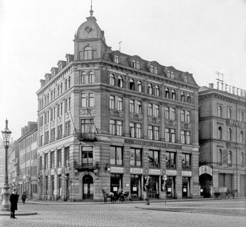 Hotel Zum grünen Baum am Roßplatz in Leipzig um 1900